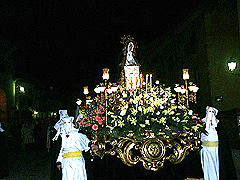 La Virgen de la Soledad (s. XVI) en la Procesión del Silencio la madrugada de Jueves Santo en Soria.